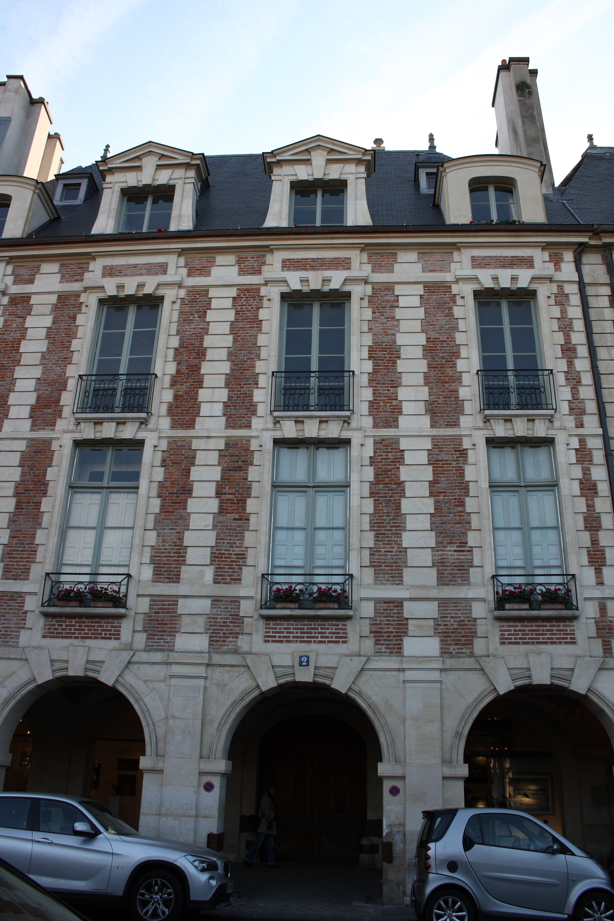 Hôtel Genou de Guiberville in Paris, 2 place des Vosges